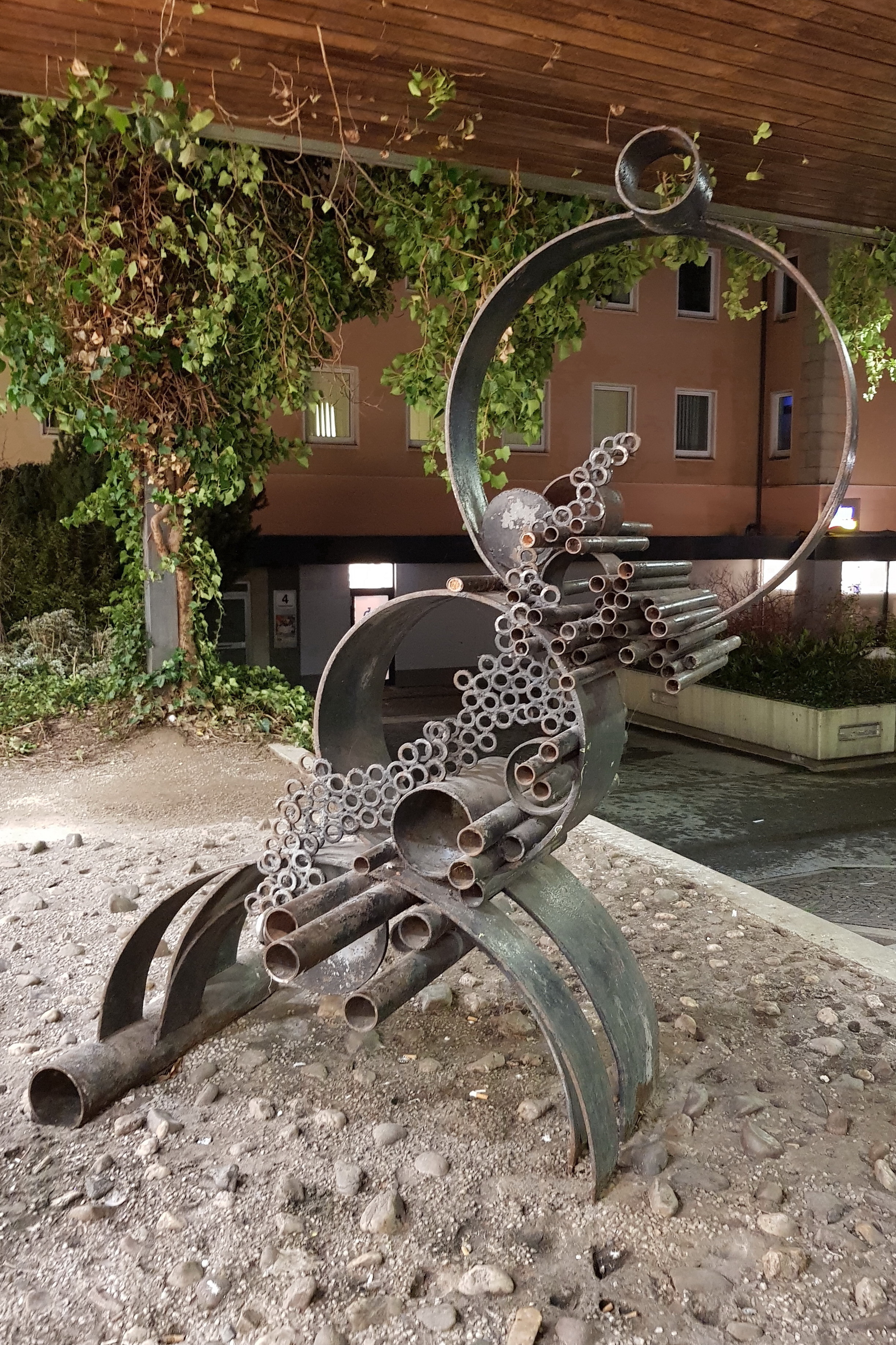 Skulptur Das Röhrchen (18. Juli 1969) des Designers Horst Wrobel in Iserlohn, Schillerplatz.